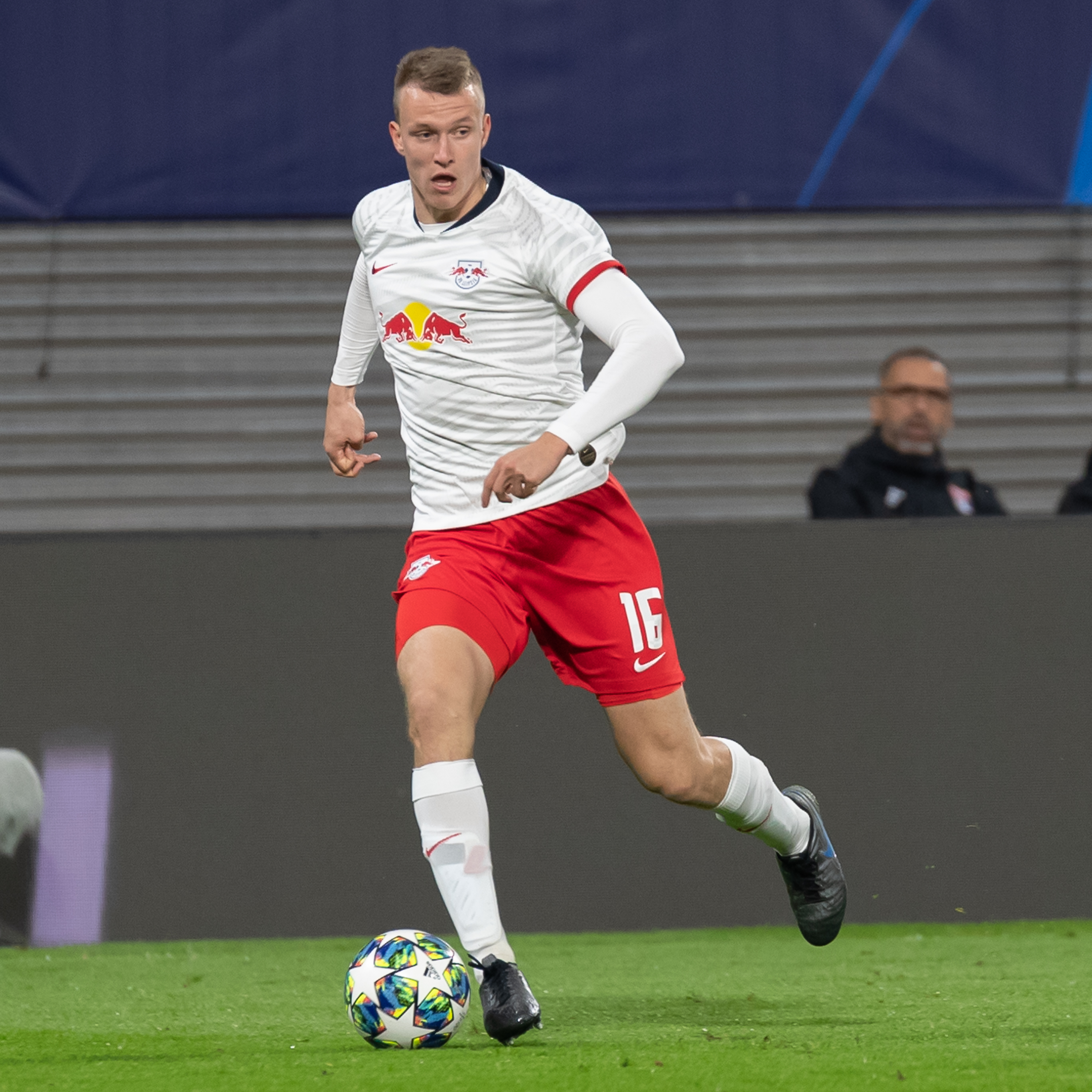 Fußball, Männer, UEFA Champions League, RB Leipzig - Olympique Lyonnais; Lukas Klostermann (RB Leipzig, 16); Freisteller, Einzelbild, Aktion, action